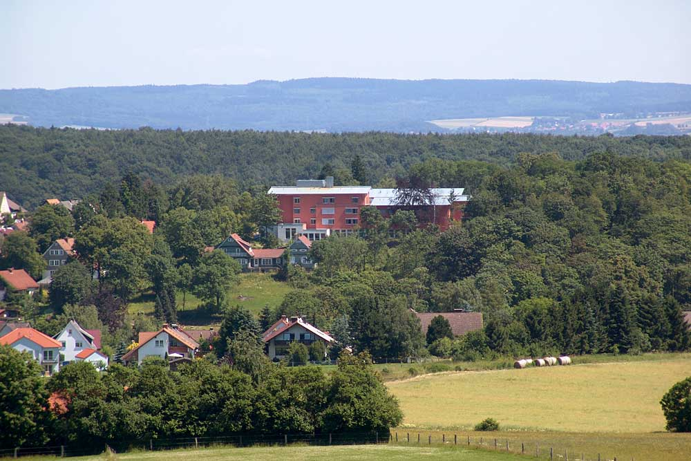 Die Fachklinik Fürstenwald mit dem davor liegenden ehemaligen Herrenhaus.